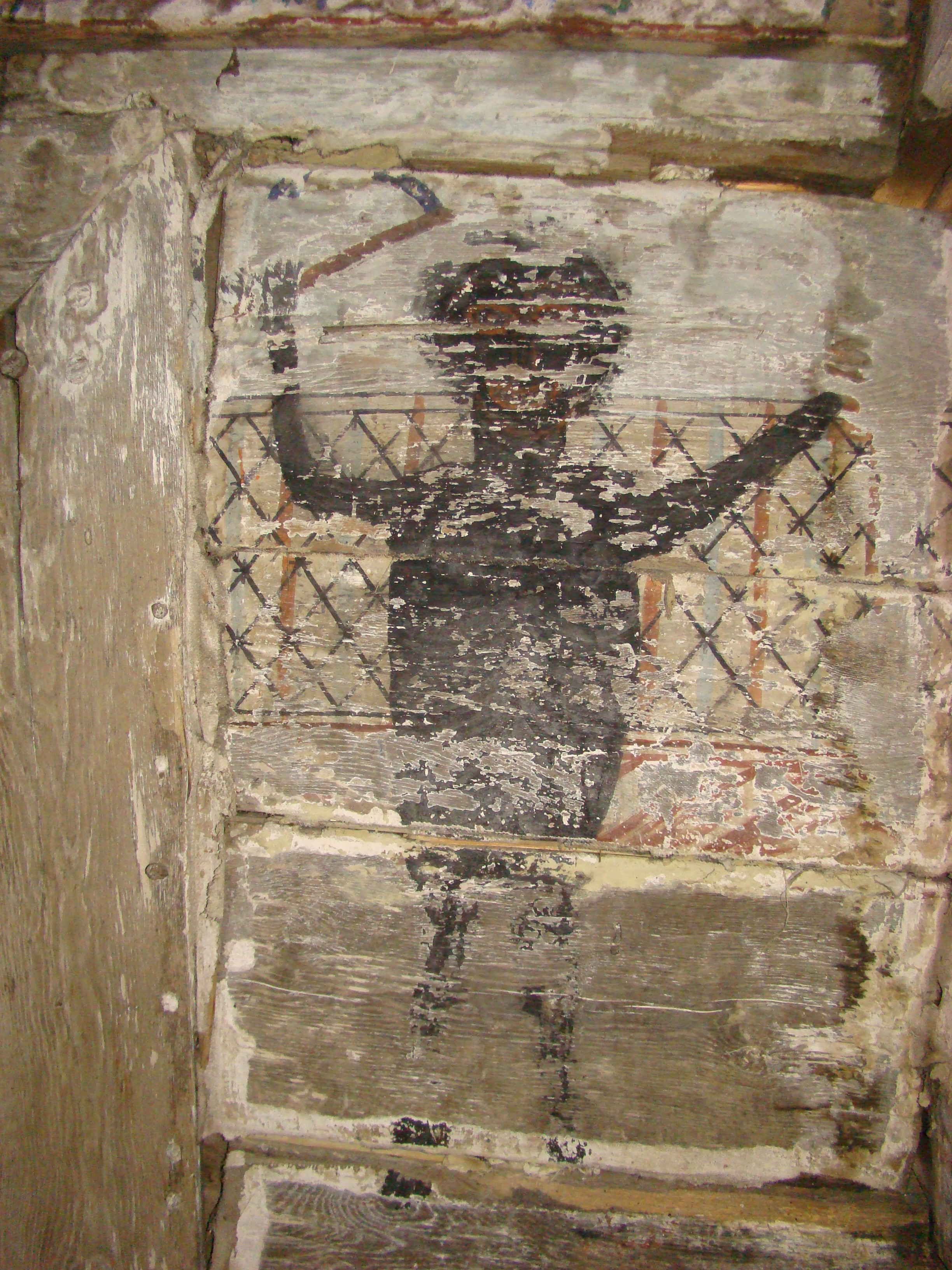 Biserica de lemn „Înălţarea Sfintei Cruci" din Pruneni